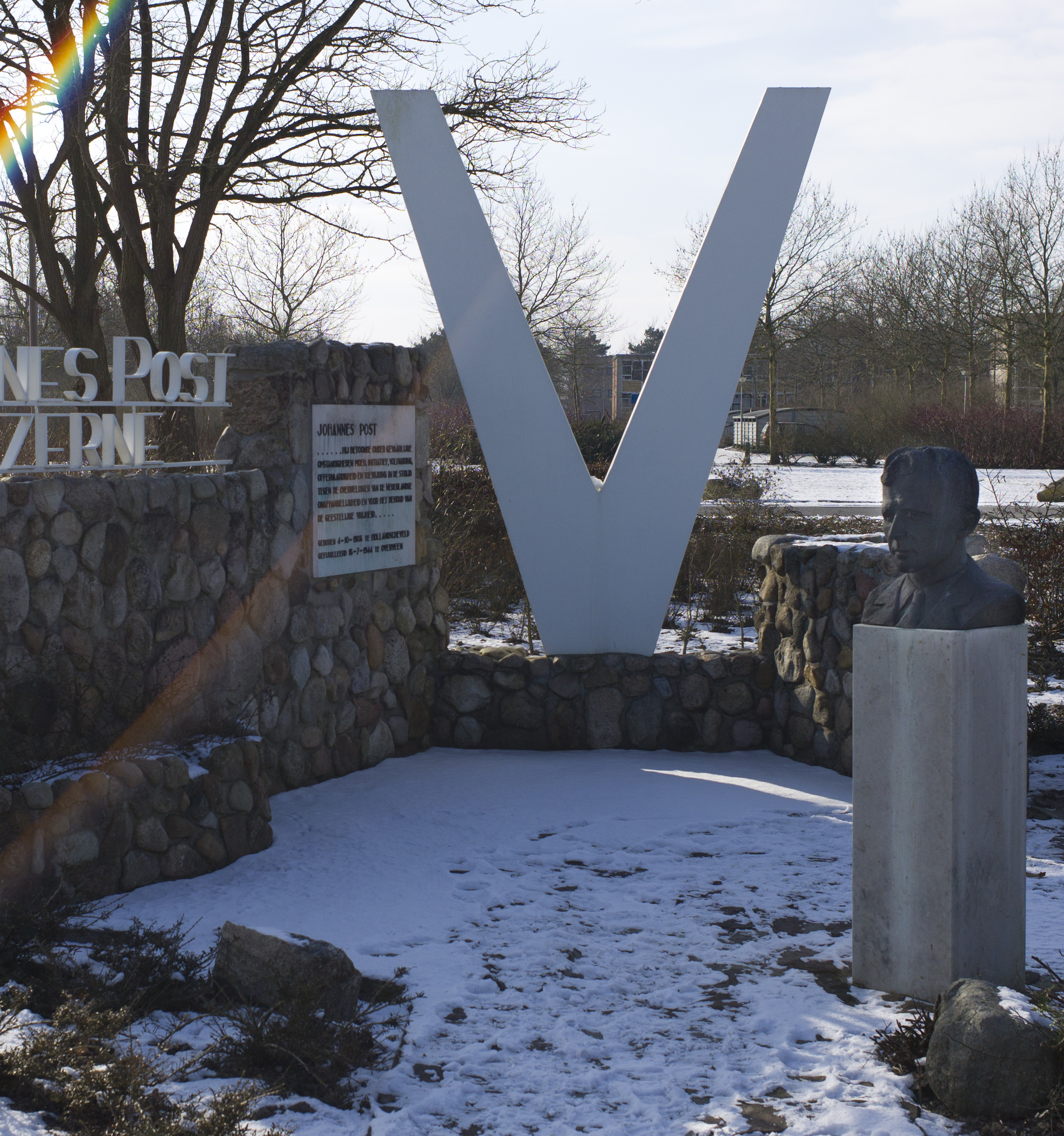 Gedenkmonument ter ere van de verzetsstrijder Johannes Post. Het monument is gelegen voor de Havelter kazerne, die naar Post is vernoemd. Het geheel bestaat uit een muur van keien, waarin een plaquette is bevestigd waarop Post staat omschreven; daarvoor staat een witgeschilderde betonnen V met daarvoor weer een buste van Post op een sokkel. De buste is gemaakt door Bert Kiewiet.